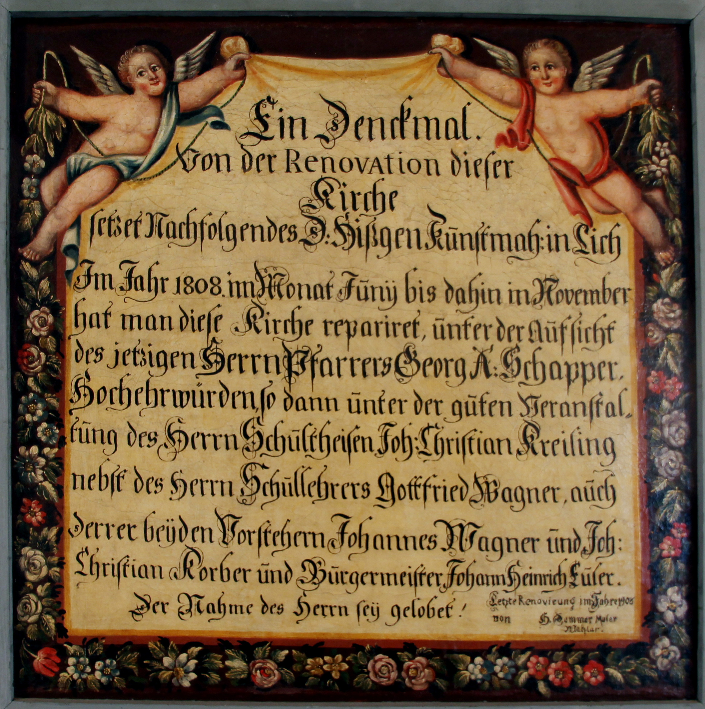 Emporenbilder von Daniel Hisgen in der Evangelischen Kirche Odenhausen (Lahn), Landkreis Gießen, Hessen, Deutschland